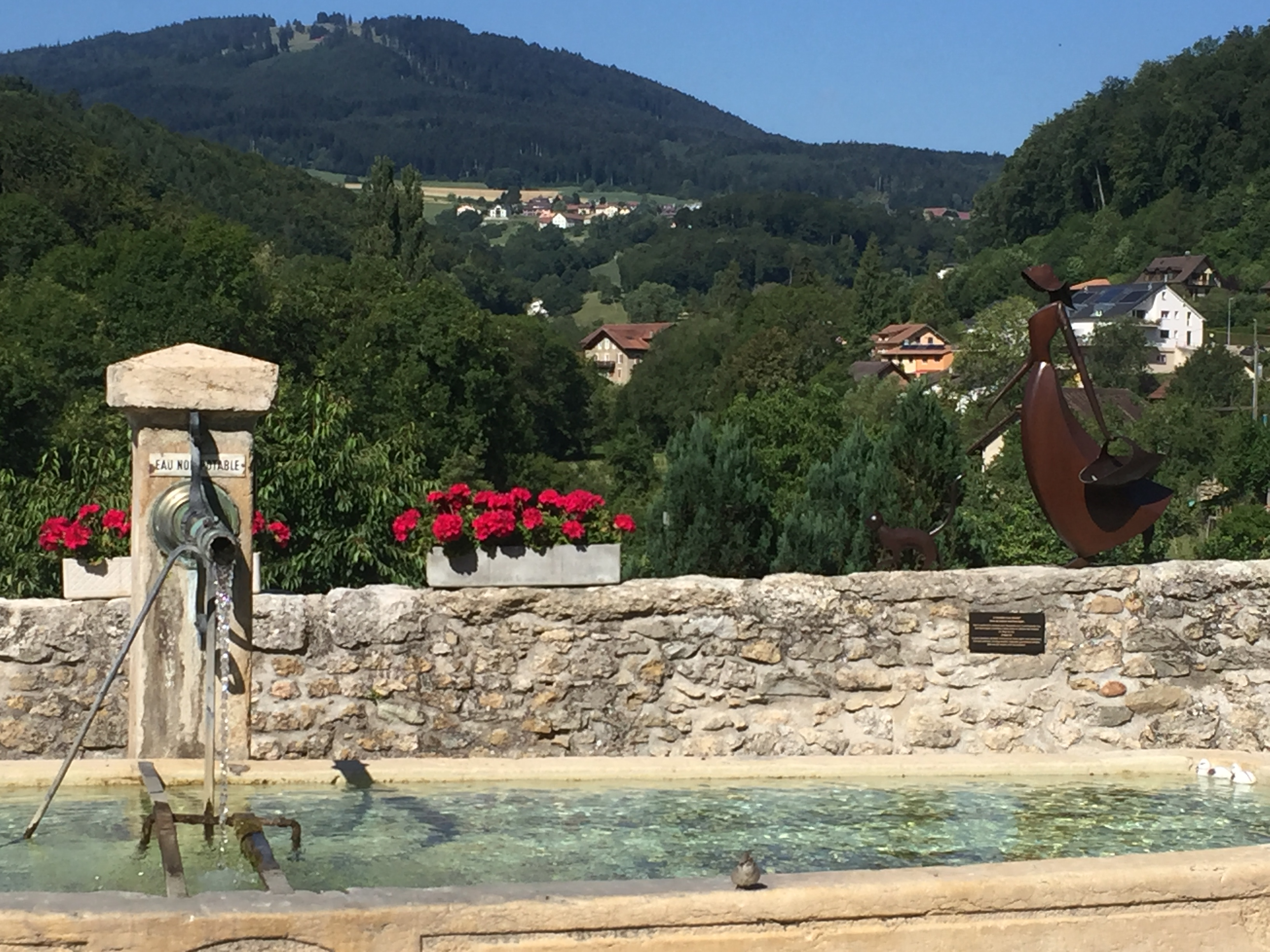 La Lavandière et son chat, imageant notre sobriquet les Buya-tsa (bouilleurs de chats). L’histoire est à découvrir sur place. Oeuvre de J-P Augier